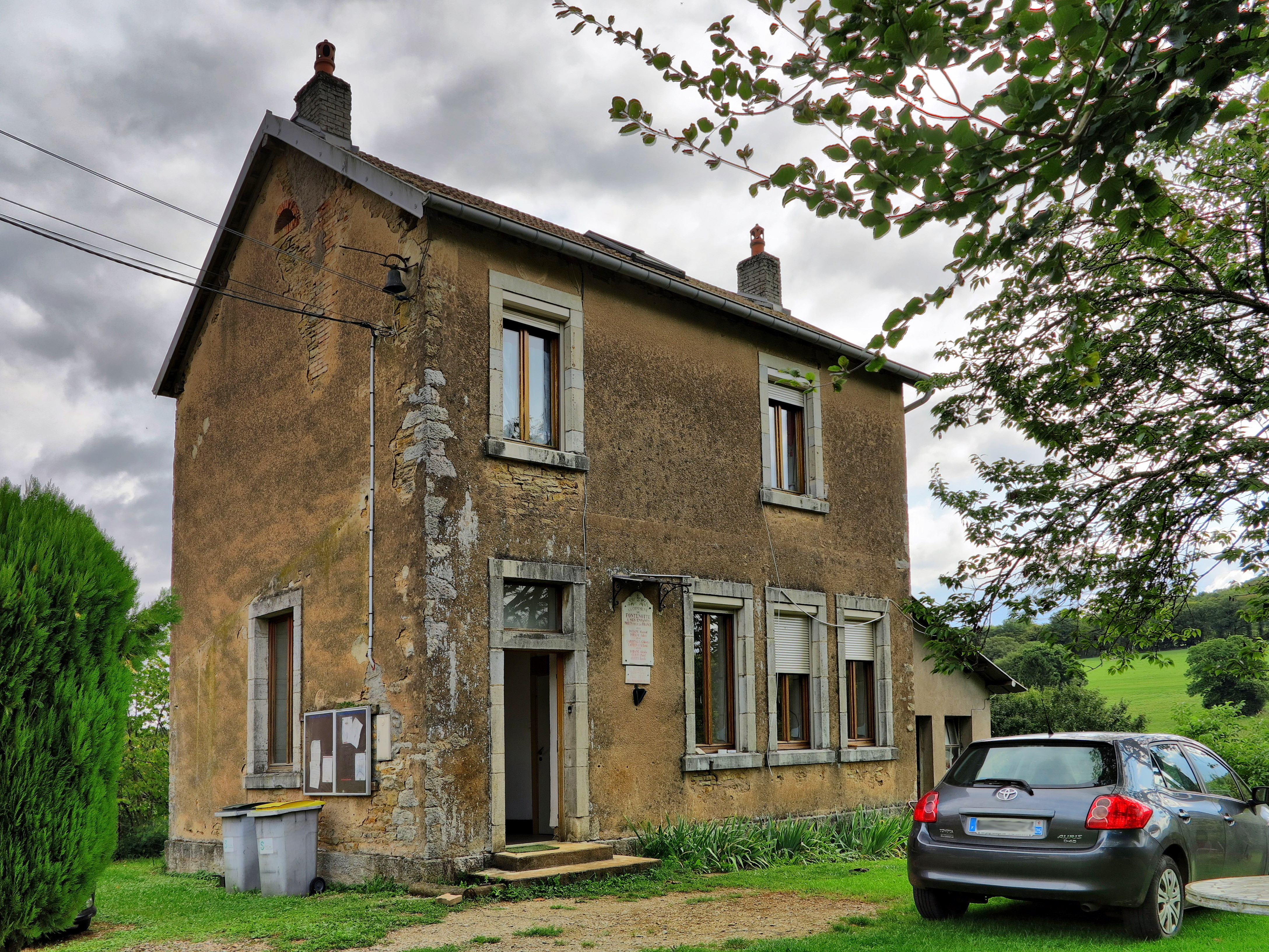 La mairie